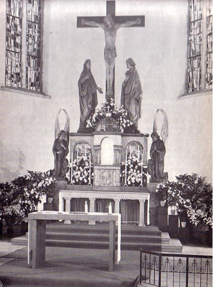 St. Laurentius Aschaffenburg Leider - Innenansicht 1963